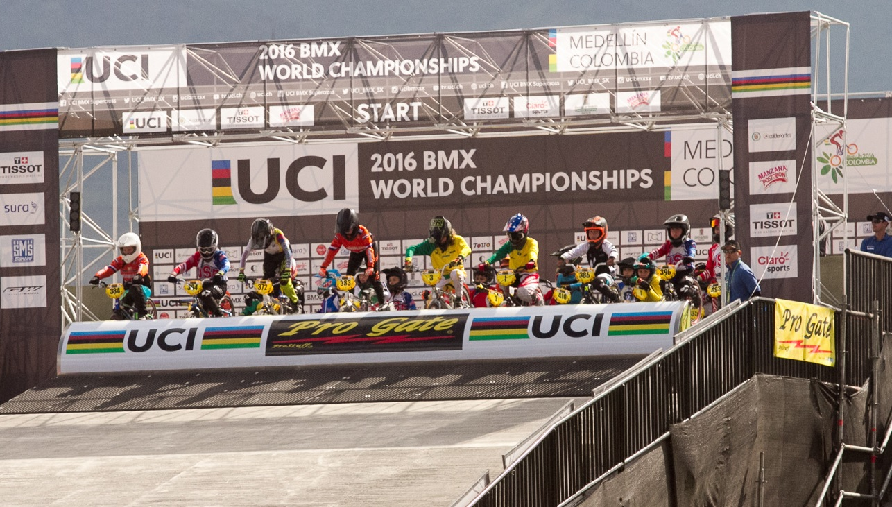 Partidor de la Pista de Supercross BMX Mariana Pajón